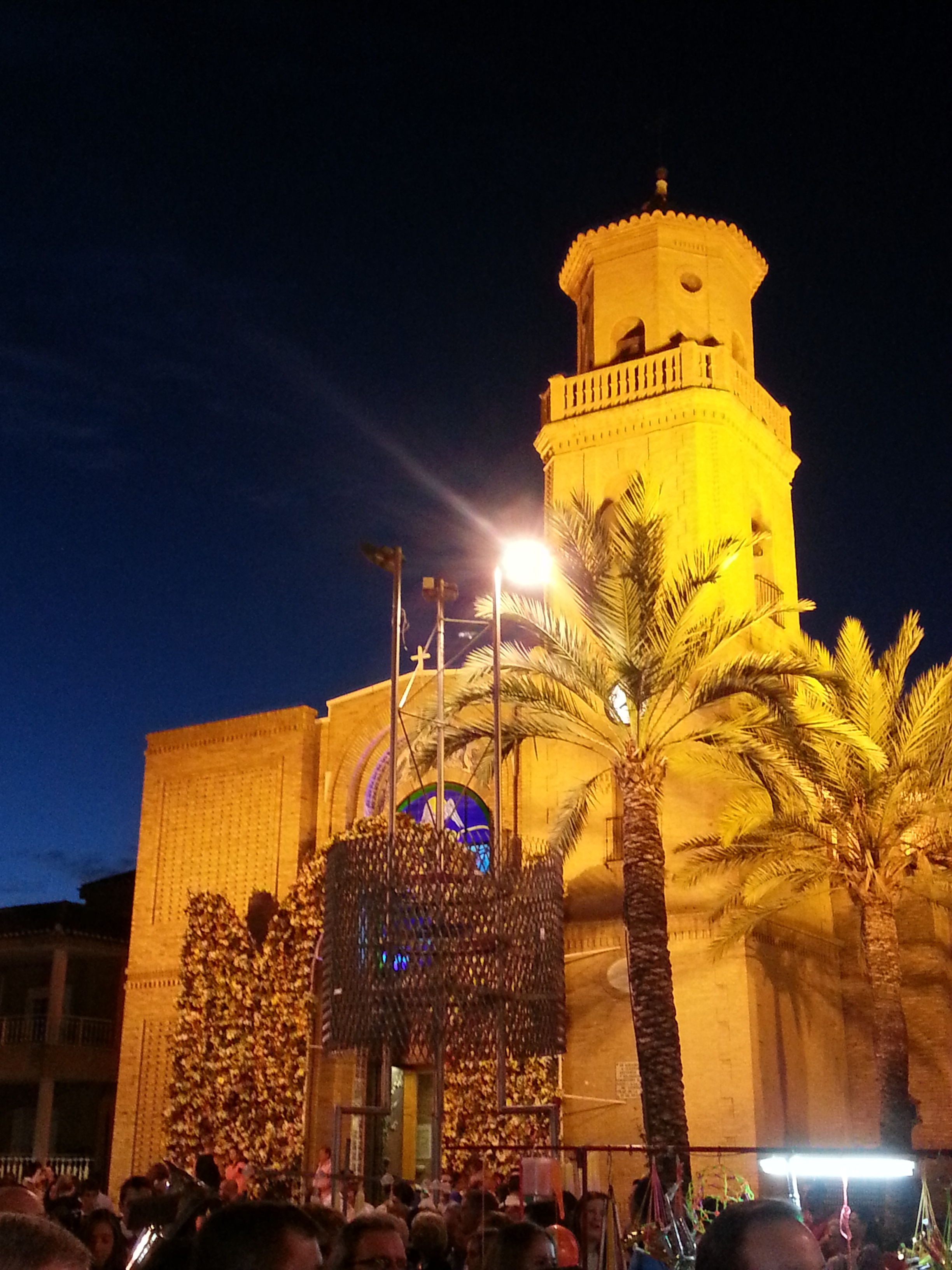 Iglesia Ntra Sra del Pilar 2014 exterior - Pilar de la Horadada